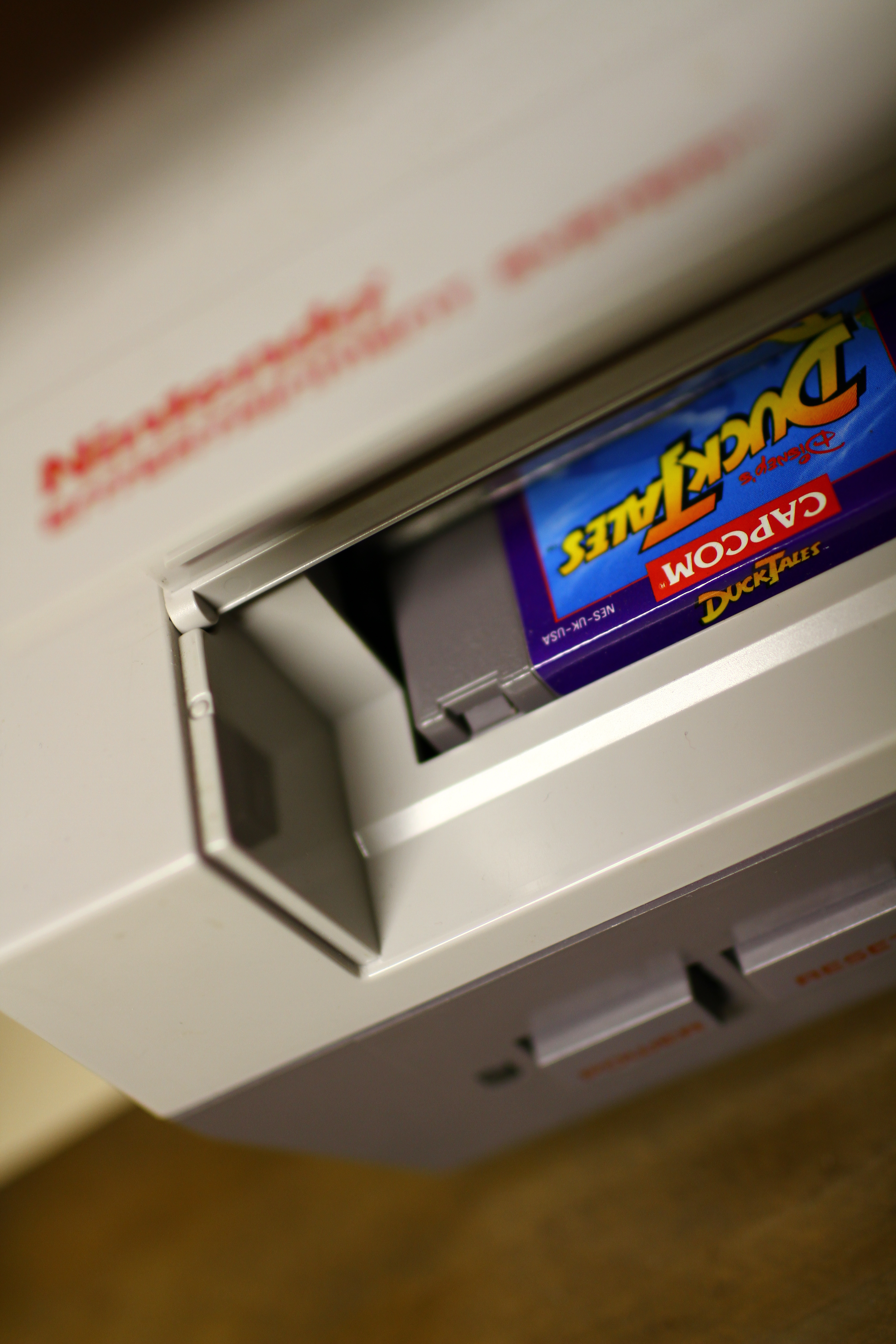 Een spelcartridge van DuckTales voor de Nintendo Entertainment System.